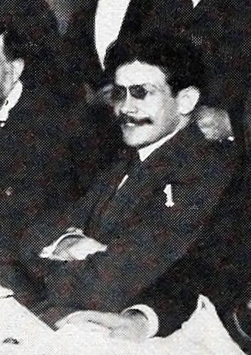 Madrid. Banquete de despedida a los redactores de Caras y Caretas.